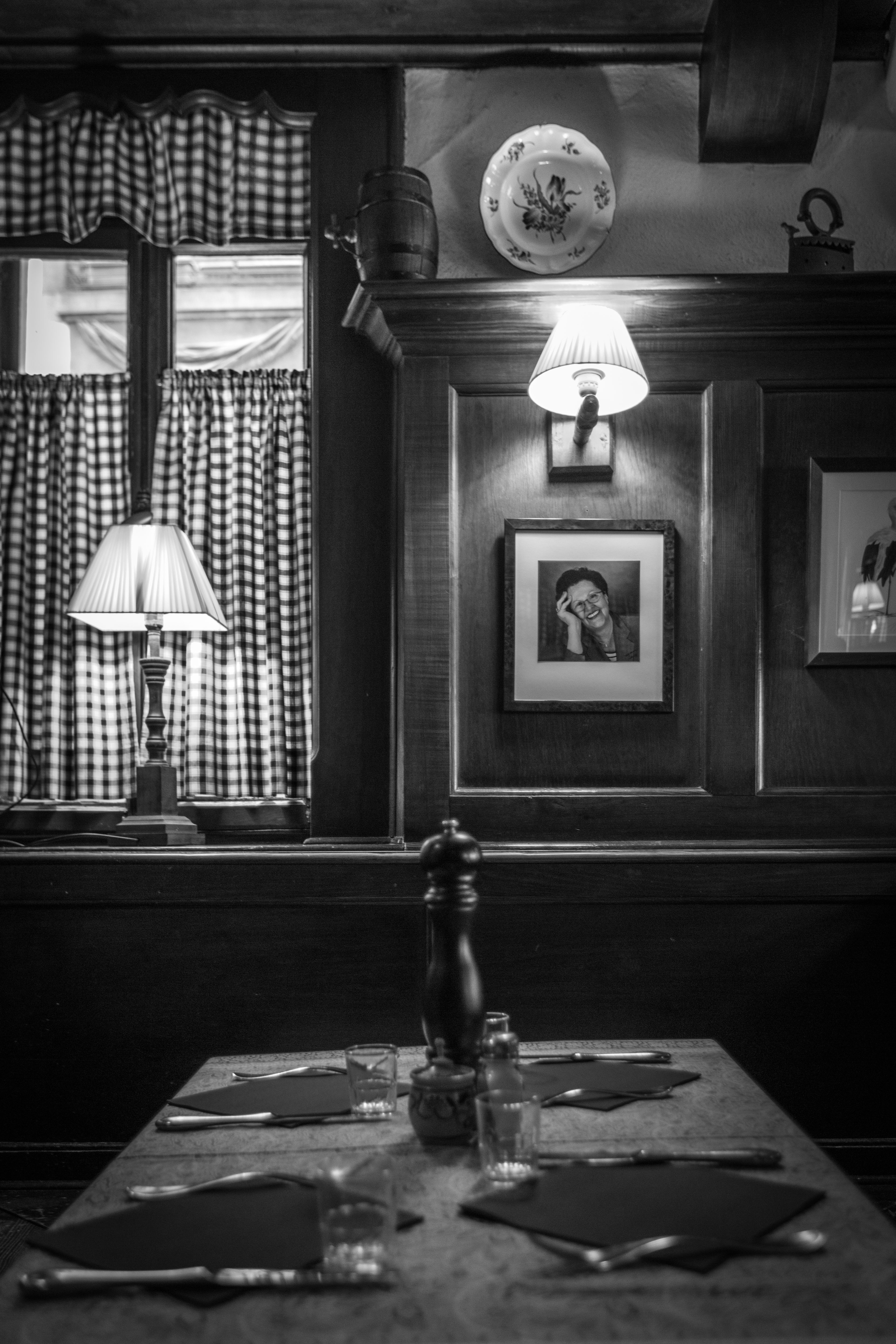 Vue intérieure de la Winstub « Chez Yvonne » Strasbourg.